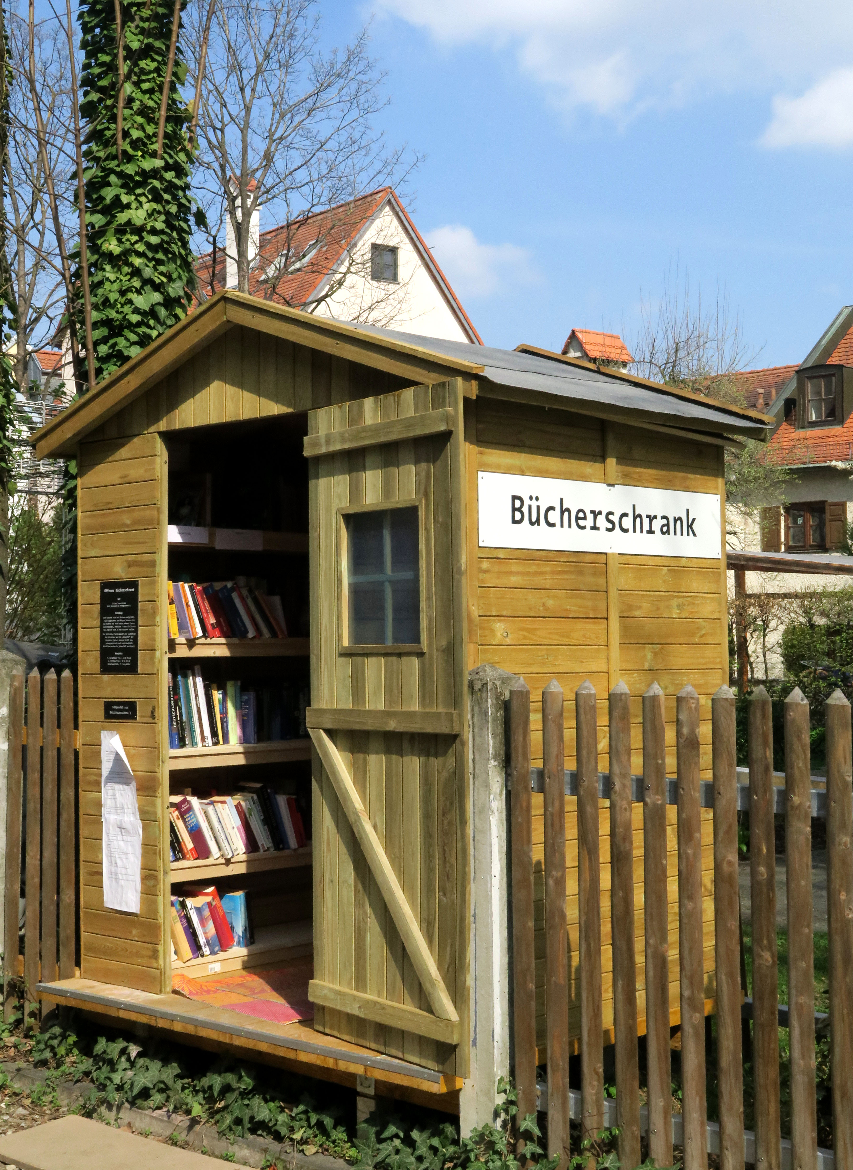 Bücherschrank im Münchener Stadtteil Au, Ecke Sammtstraße, Adresse Hergottseck 2, in einer eingerückten Ecke des zur Pfarrei Maria-Hilf gehörenden Seniorenzentrums